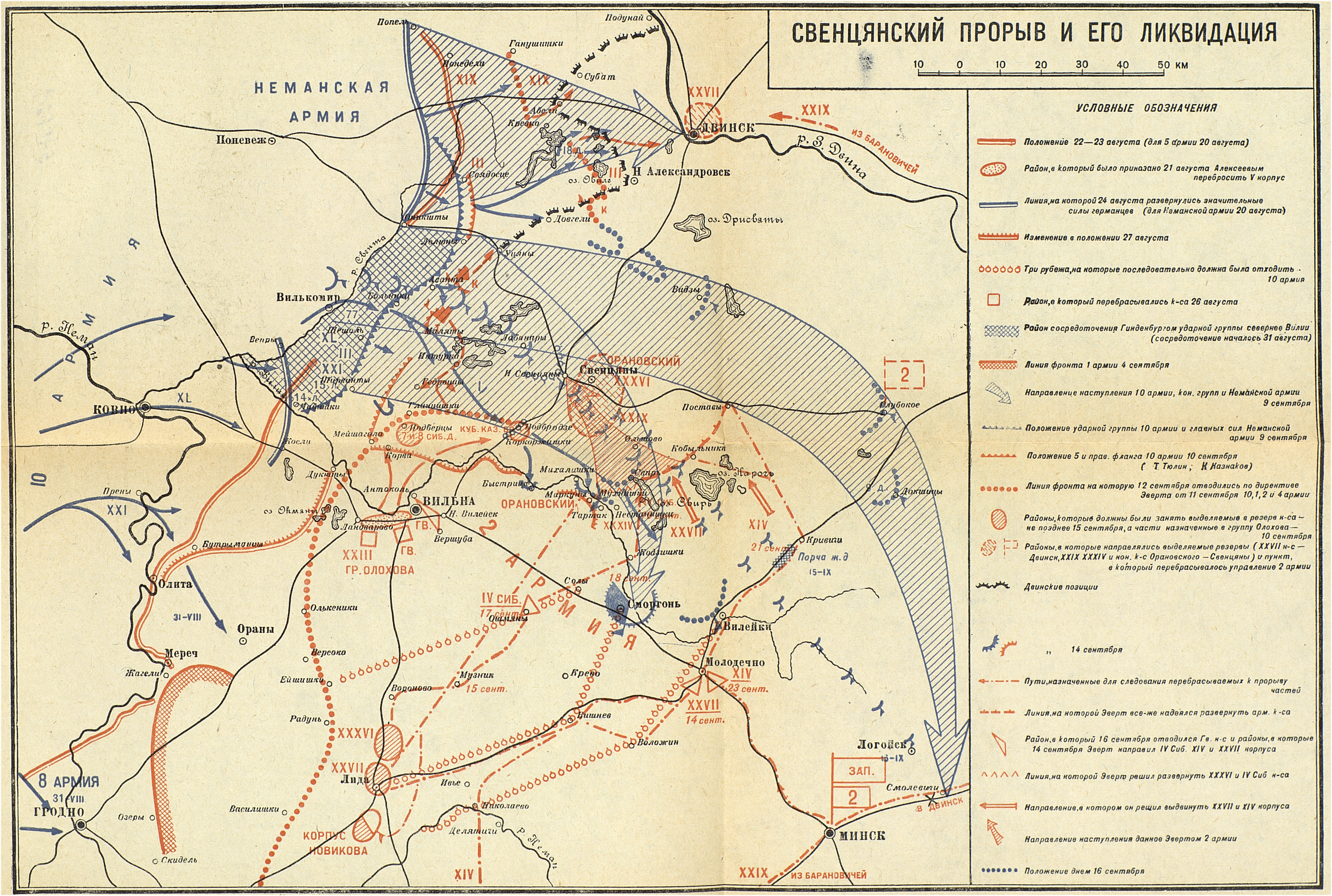 Лист №42. Кампания 1915г. Русский театр. Отход русских армий. Свенцянский прорыв и его ликвидация (период с 22 августа по 16 сентября).